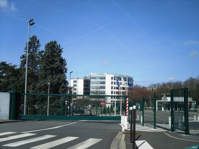 Le centre de recherche et développement Sanofi-Aventis de Chilly-Mazarin (91)